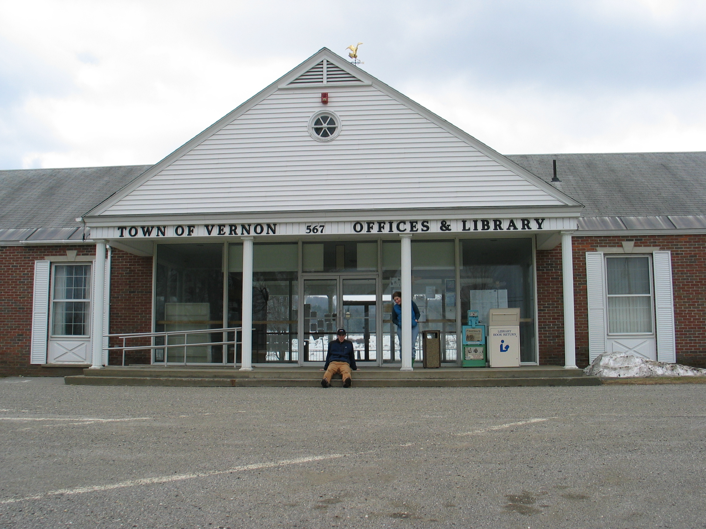 Vernon, Vermont